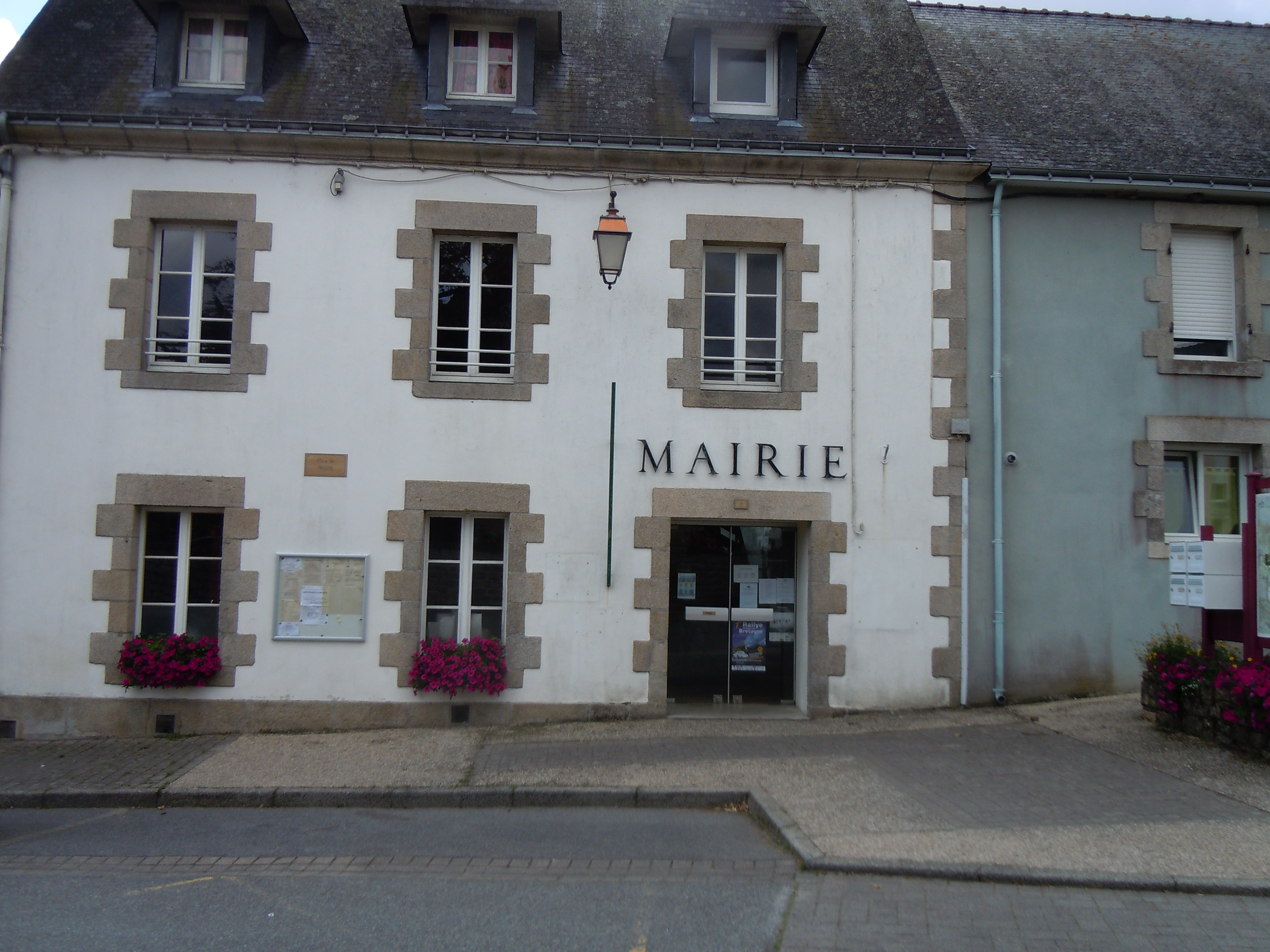 mairie de Guilligomarc'h, département du Finistère, France